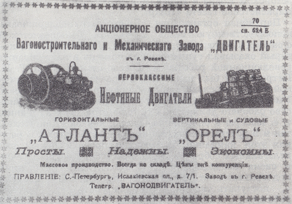 Реклама завода "Двигатель", Ревель, 1911 год